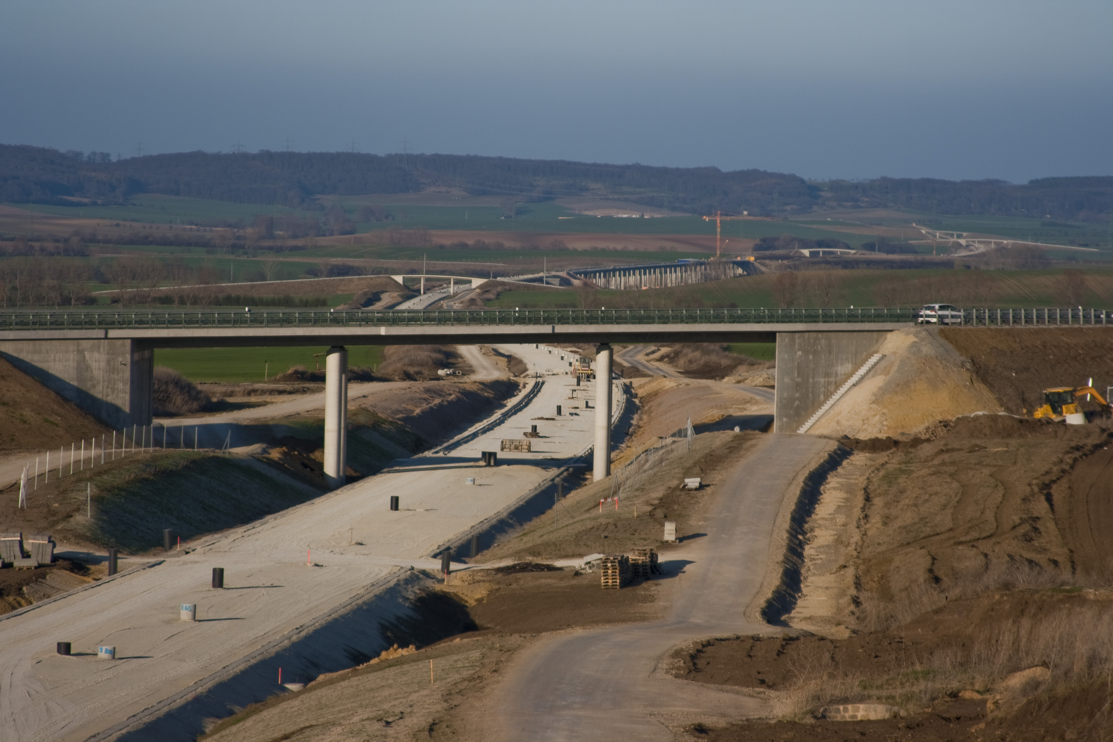 Neubaustrecke Erfurt - Leipzig-Halle - NBS km 219